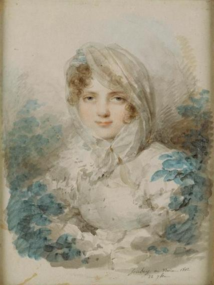 Miniatures et enluminures.